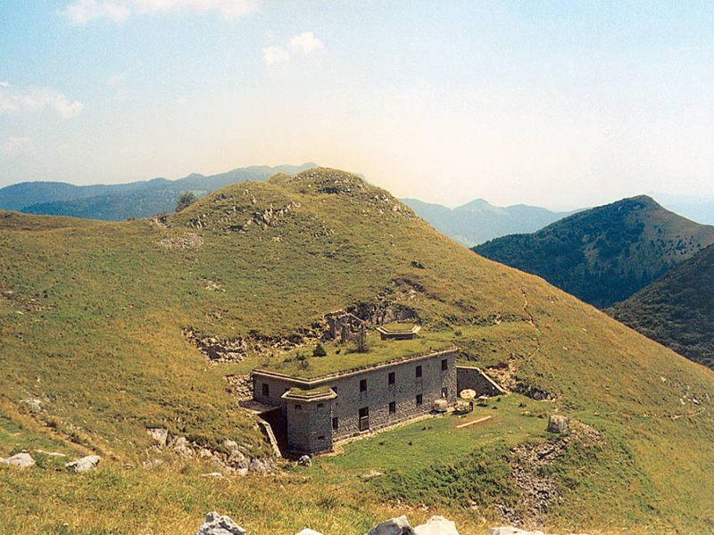 Vojašnica na Slatniku